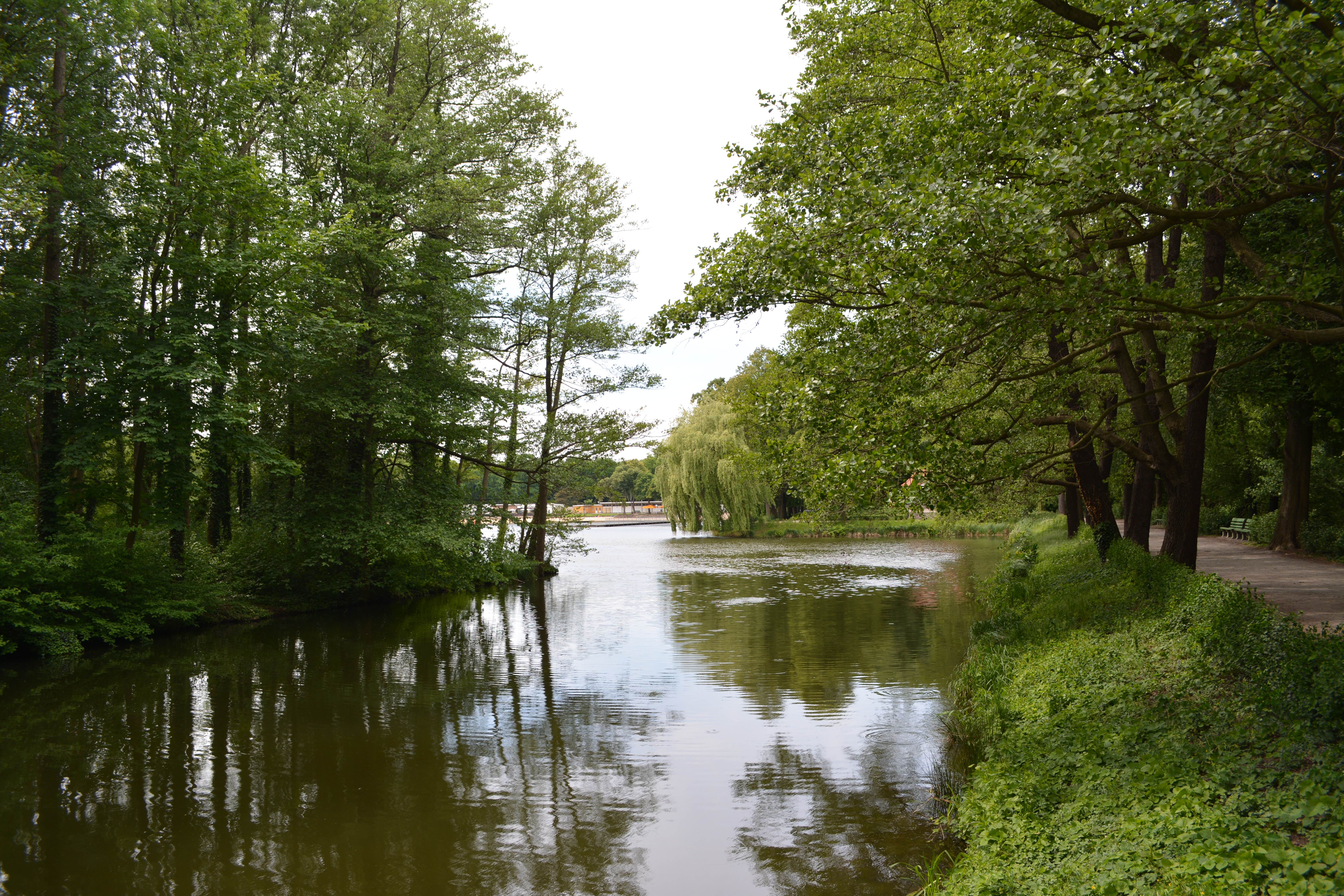 Blick auf den Jungfernheideteich in Richtung Freibad im denkmalgeschützten Volkspark Jungfernheide in Berlin-Charlottenburg